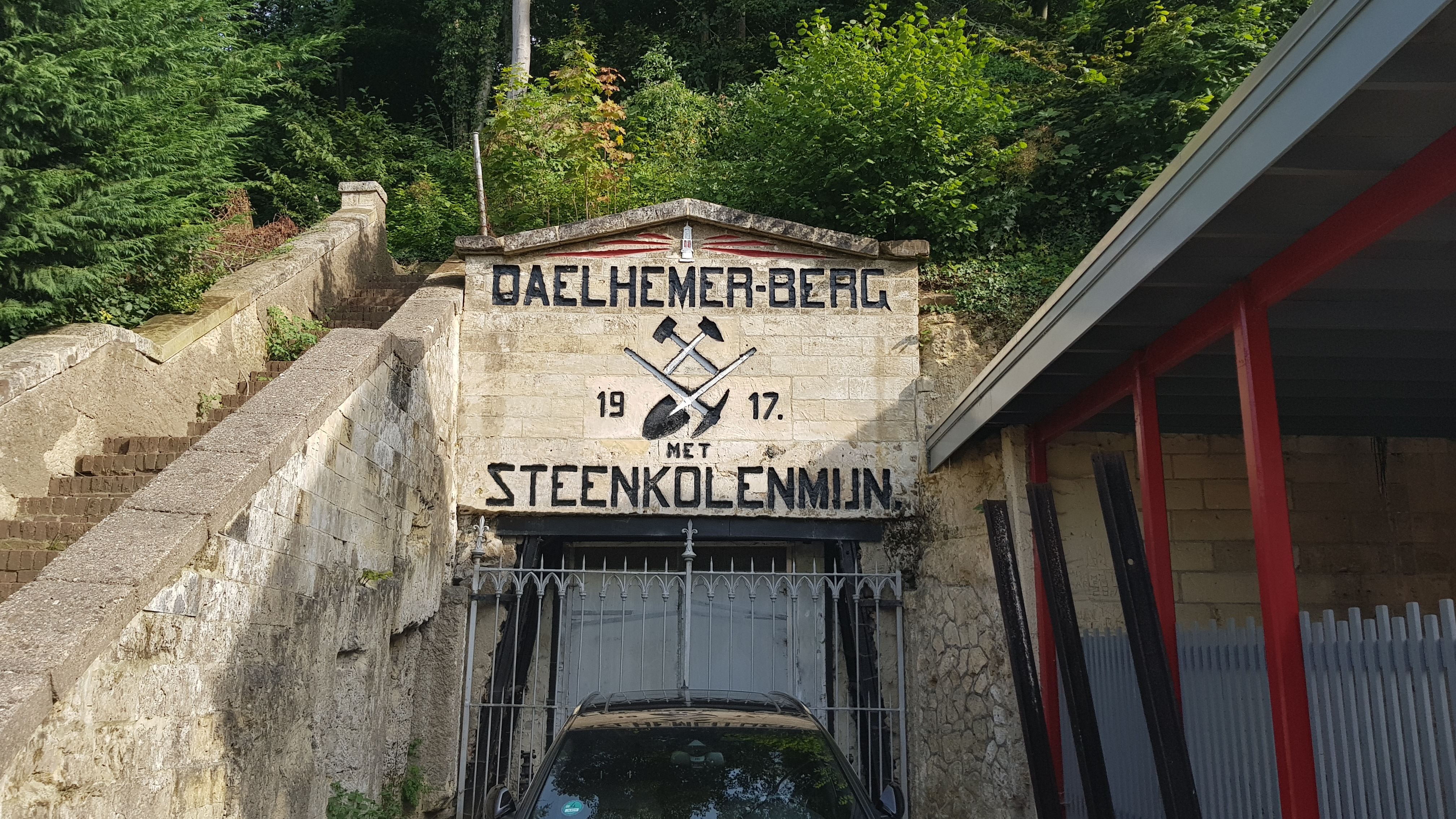 noordelijke ingang Steenkolenmijn Valkenburg, Nederland